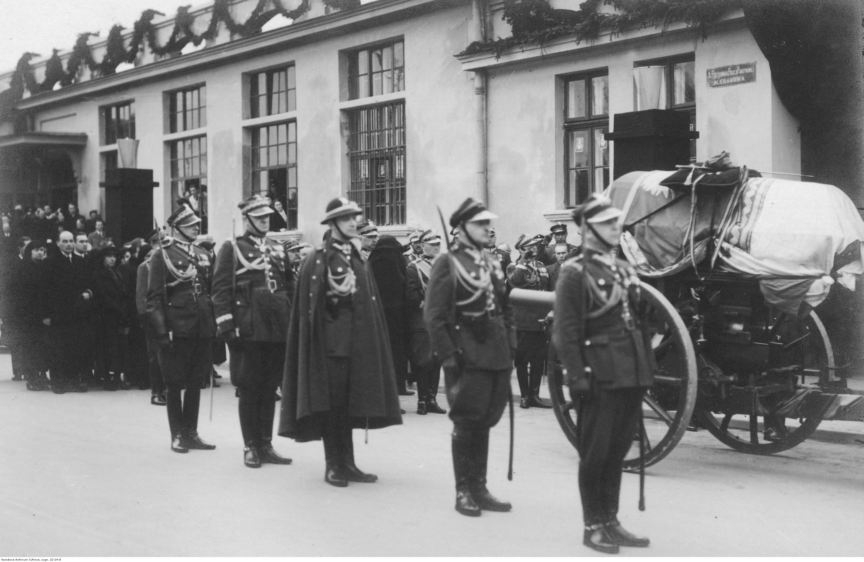 Trumna umieszczona na 100 mm haubicy wz. 14/19 w otoczeniu wojska, za nią rodzina Józefa Piłsudskiego i delegacja ziemi wileńskiej przed budynkiem Dworca Zachodniego. Widoczni także m.in.: płk Strzelców Podhalańskich Witold Wartha (3. z prawej na pierwszym planie), gen. Stanisław Rouppert (stoi za płk. W. Warthą), gen. Edward Rydz-Śmigły (w głębi, w środku).